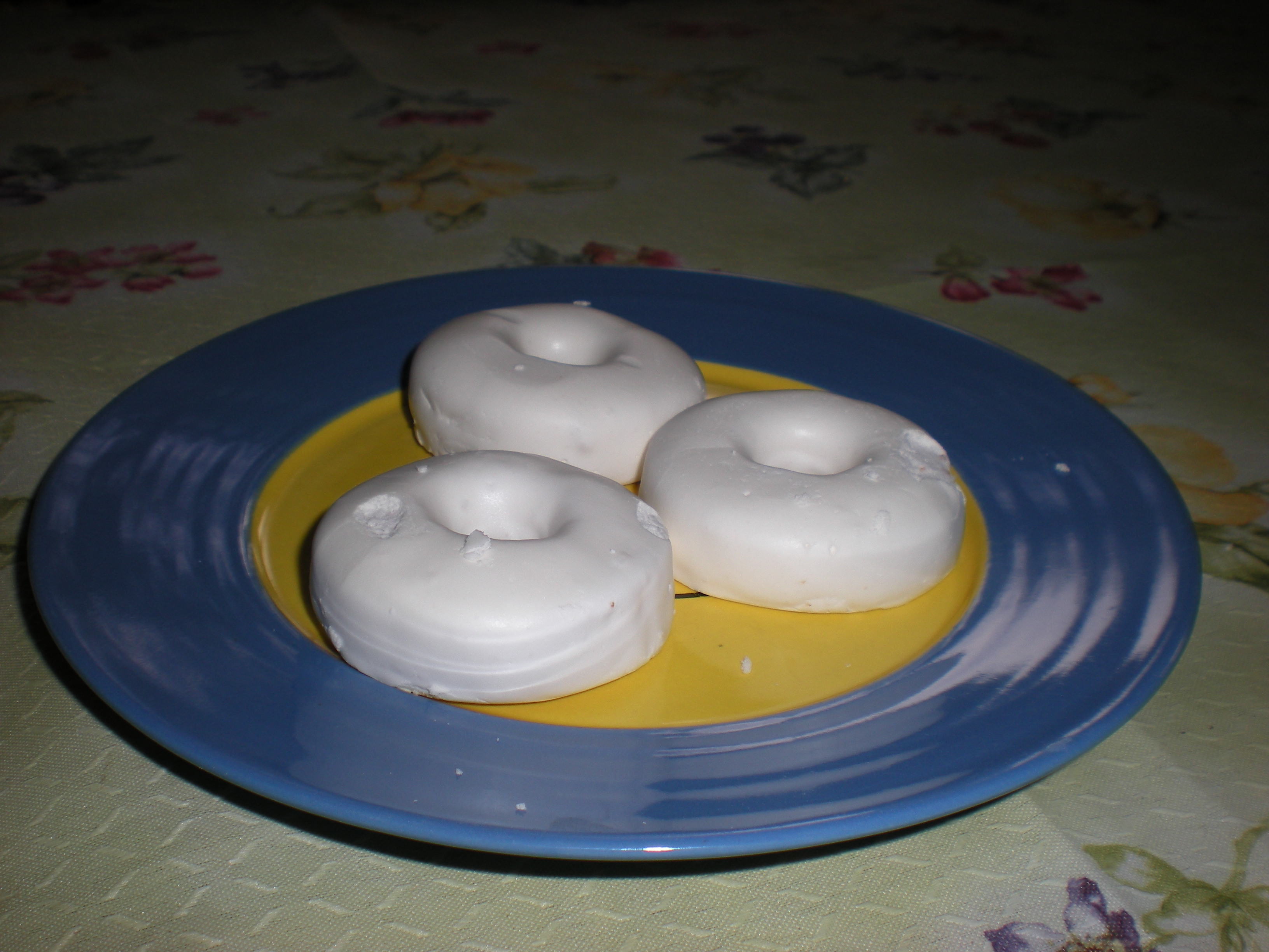 Rousquille catalane, spécialité du Vallespir.